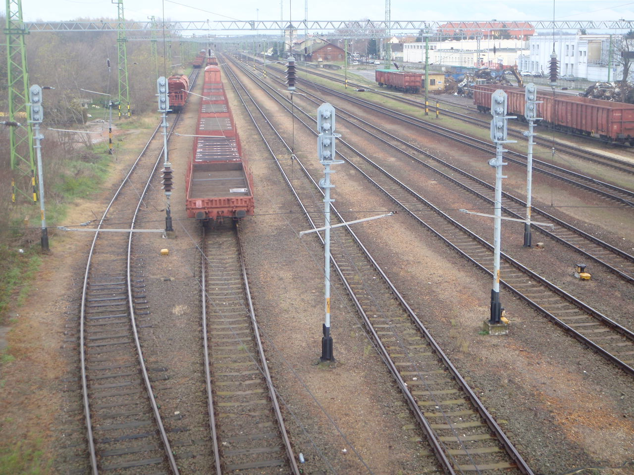 Bahnhof Sárvár